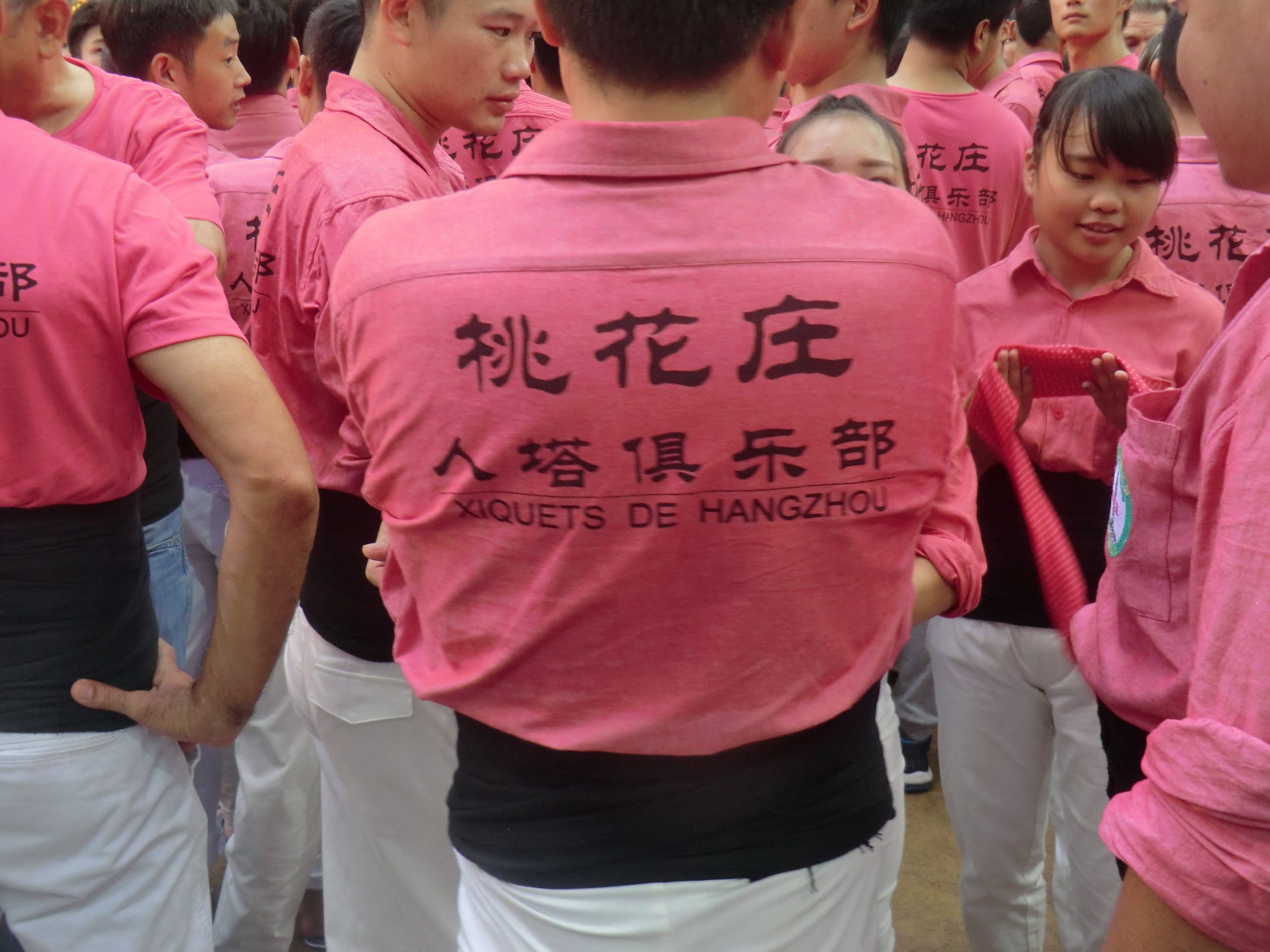 Camisa dels Xiquets de Hanghzou al Concurs de Castells de Tarragona 2016